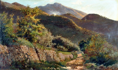 Strada di campagna, olio su tavola, 40 x 66 cm, collezione privata